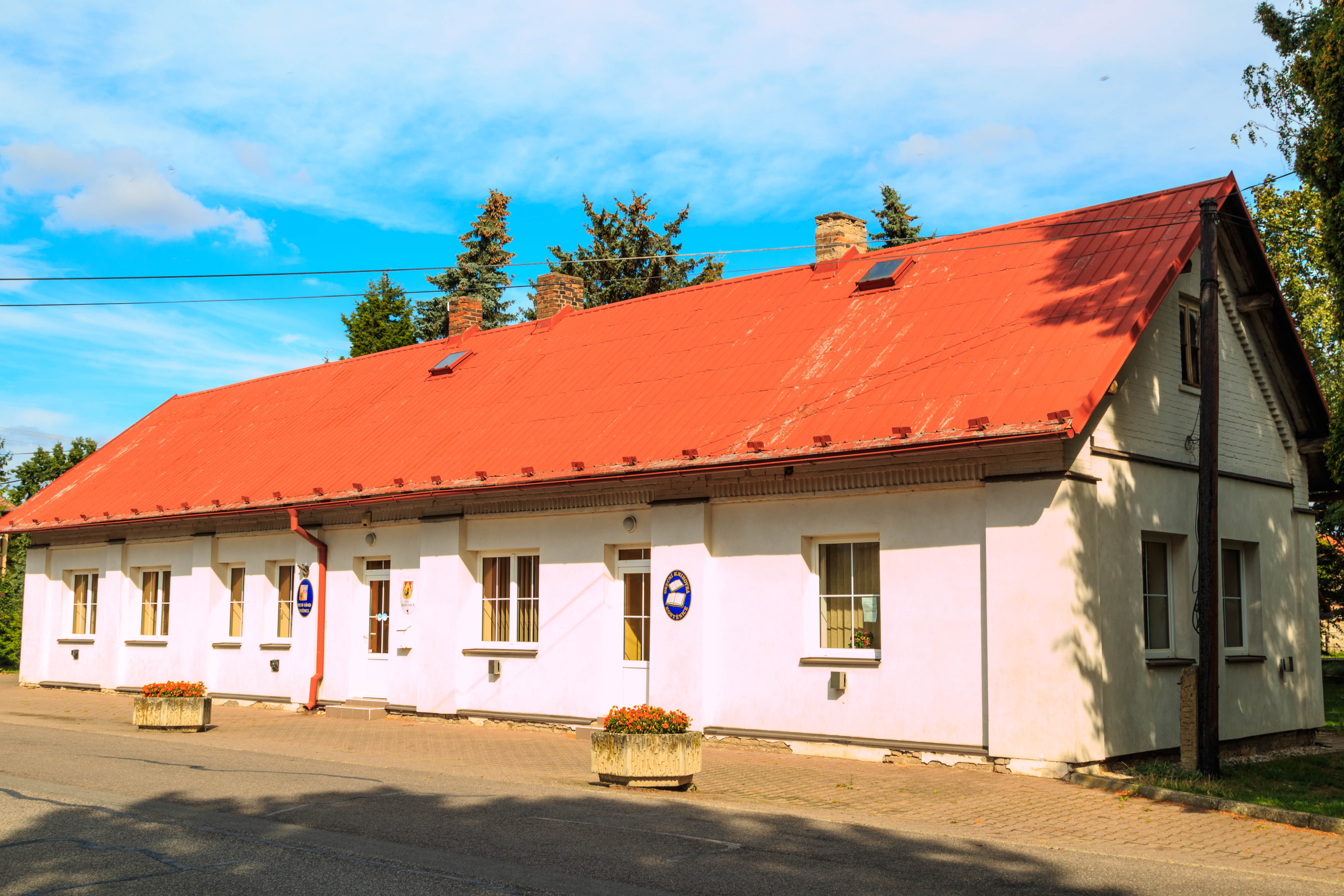 Kostěnice obecní úřad